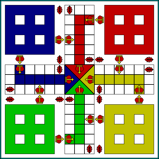 Tablero y posición inicial del juego Royal Ludo.